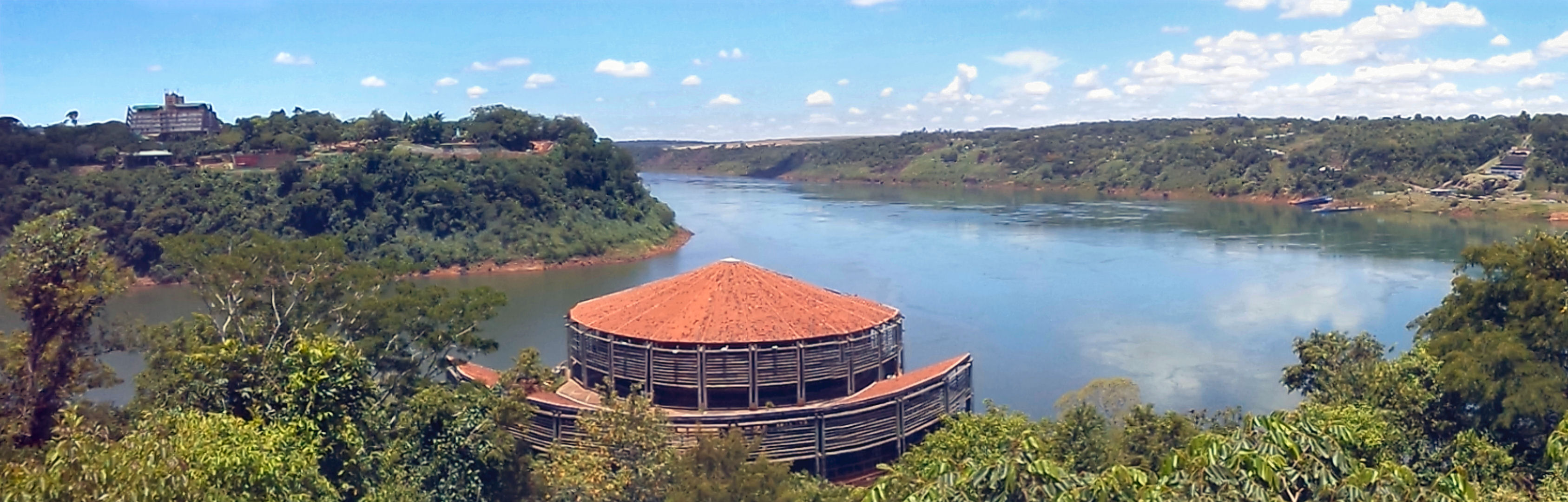 Panorâmica da Tríplice Fronteira entre o Brasil, a Argentina (esquerda) e o Paraguai (direita) em Foz do Iguaçu, Paraná, Sul do Brasil.